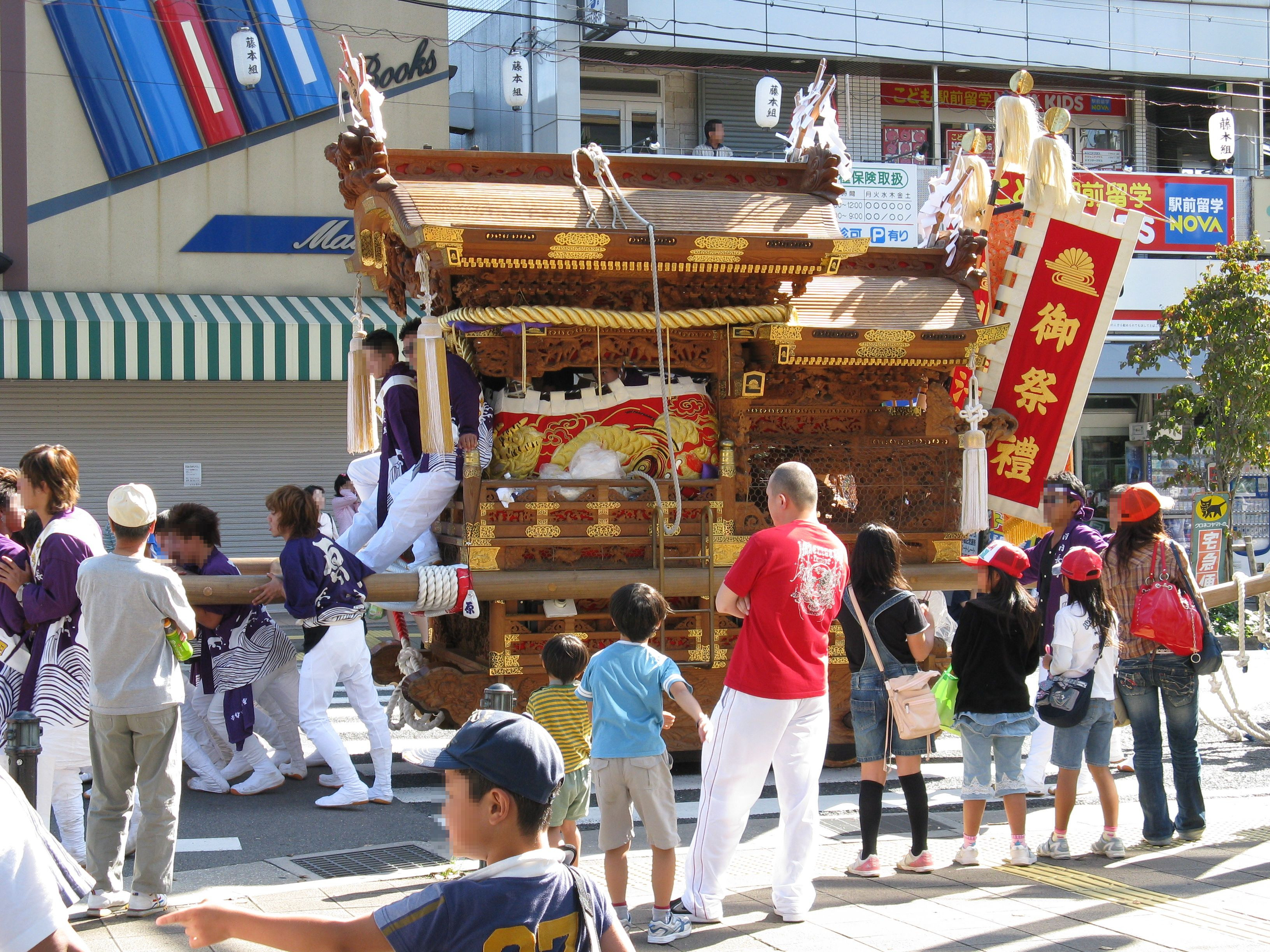 西代神社のだんじり